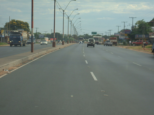 calle